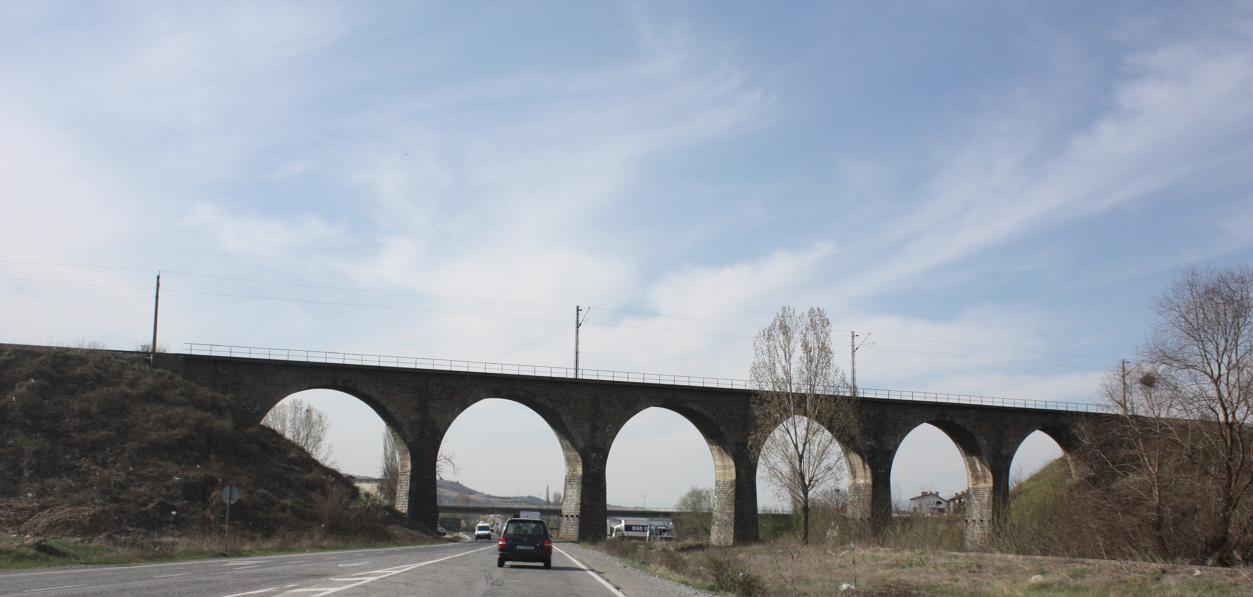 Djerman (village), Bulgaria